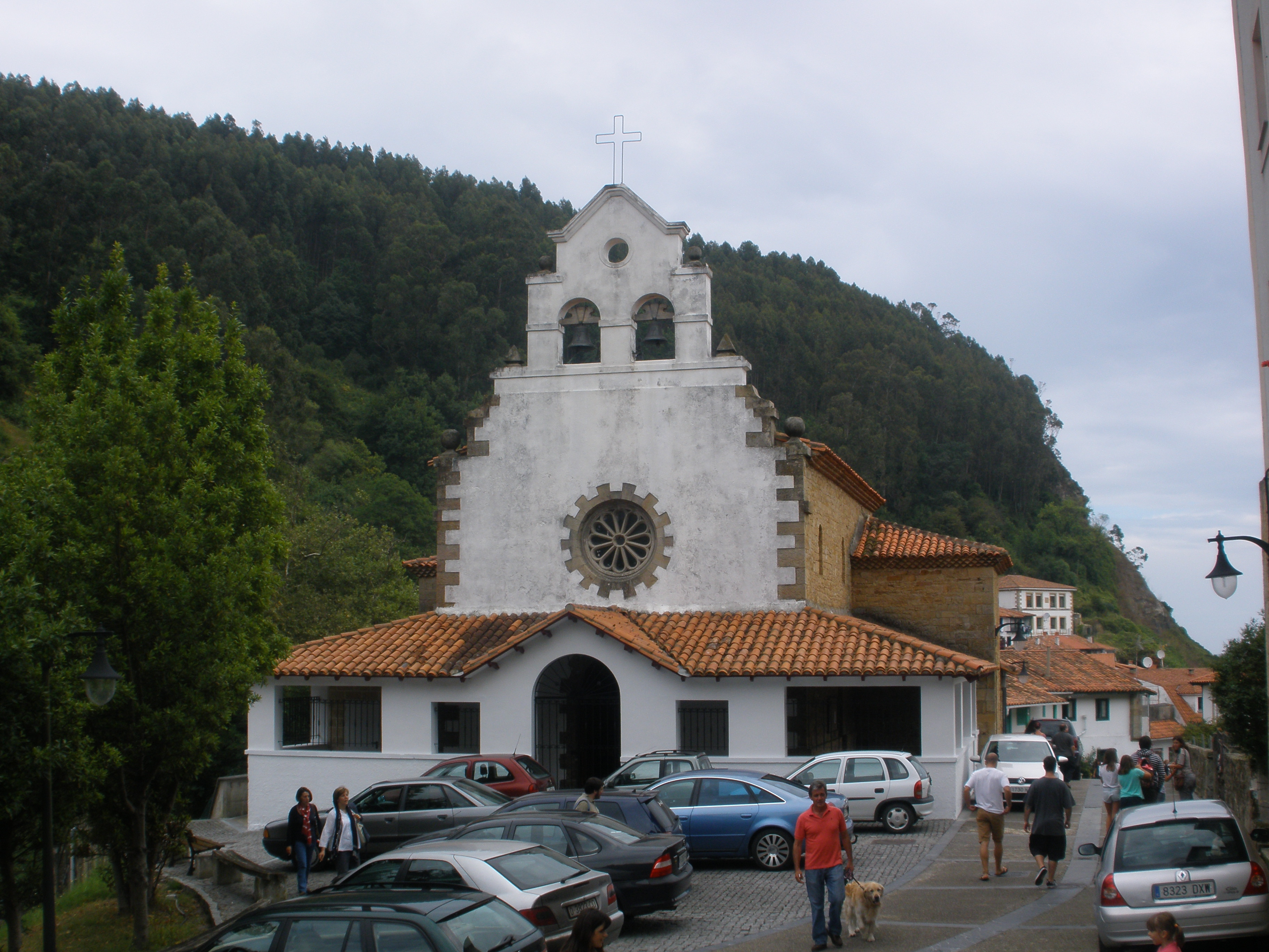 Iglesia parroquial de San Miguel. Tazones, Villaviciosa